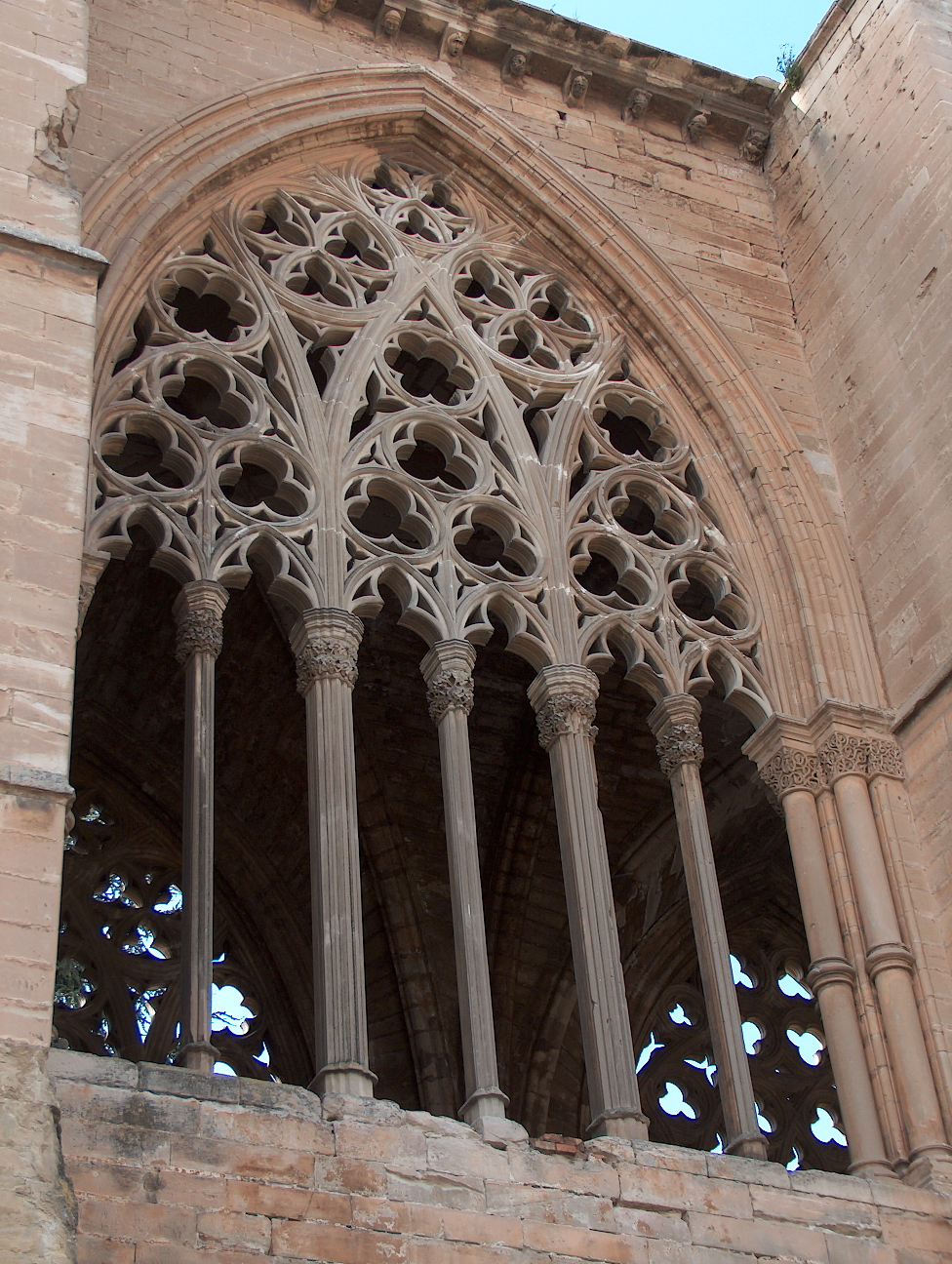 Sé Velha de Lérida. Sé Velha de Lérida em Espanha.